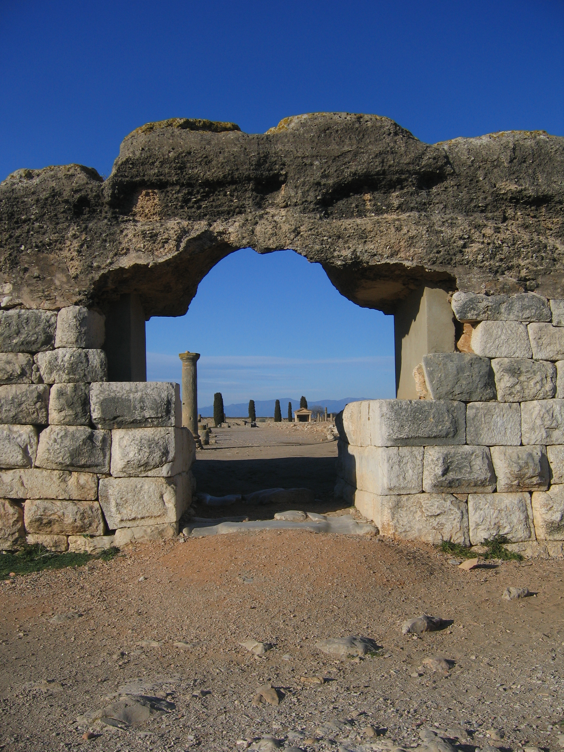 Ampurias (en catalán Empúries) fue una ciudad griega y romana situada en el noreste de la península Ibérica, en la comarca gerundense del Alto Ampurdán. Fue fundada en 575 a. C.